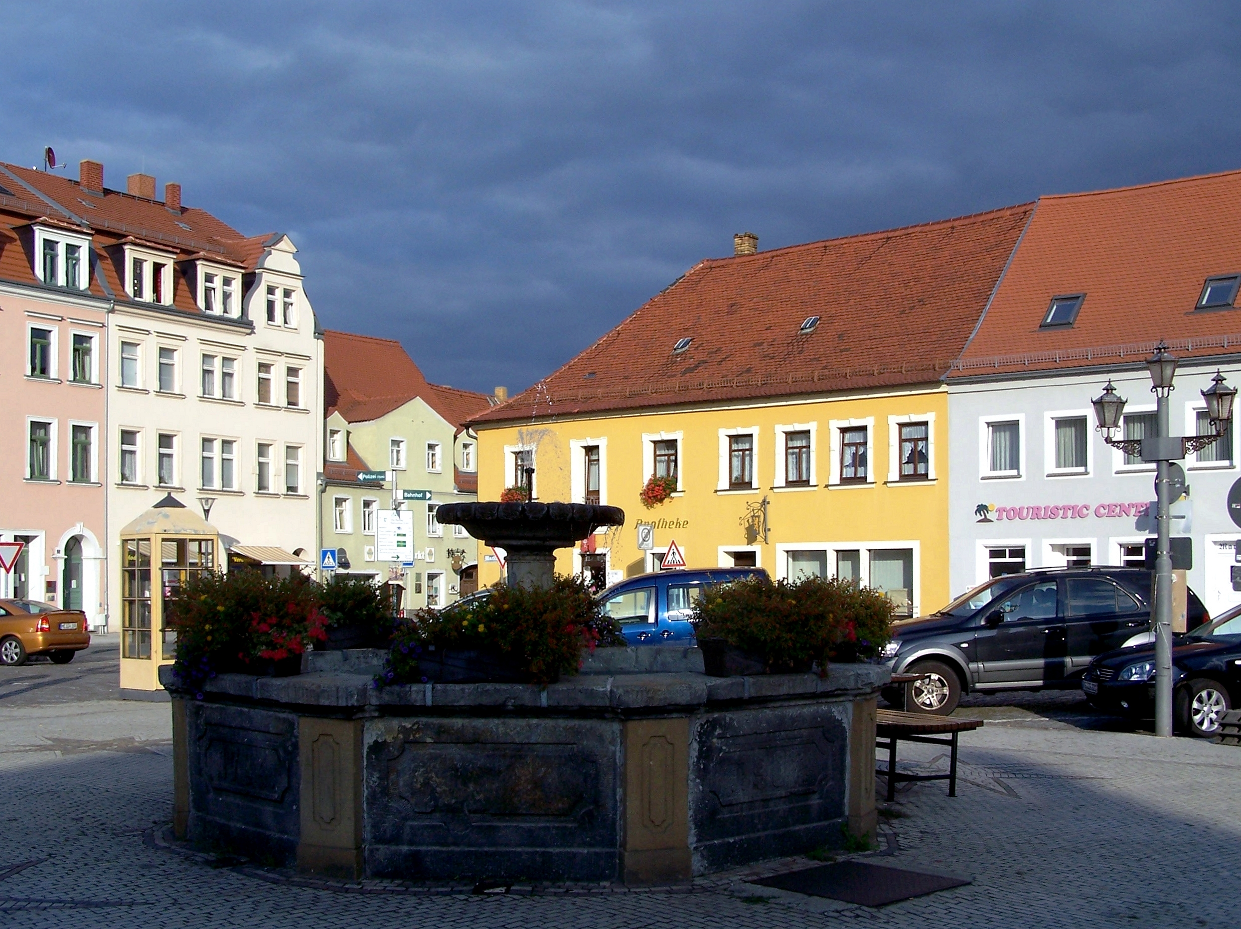 Náměstí v Radeburgu, Sasko, Německo